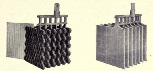 Piatti di un accumulatore al piombo.